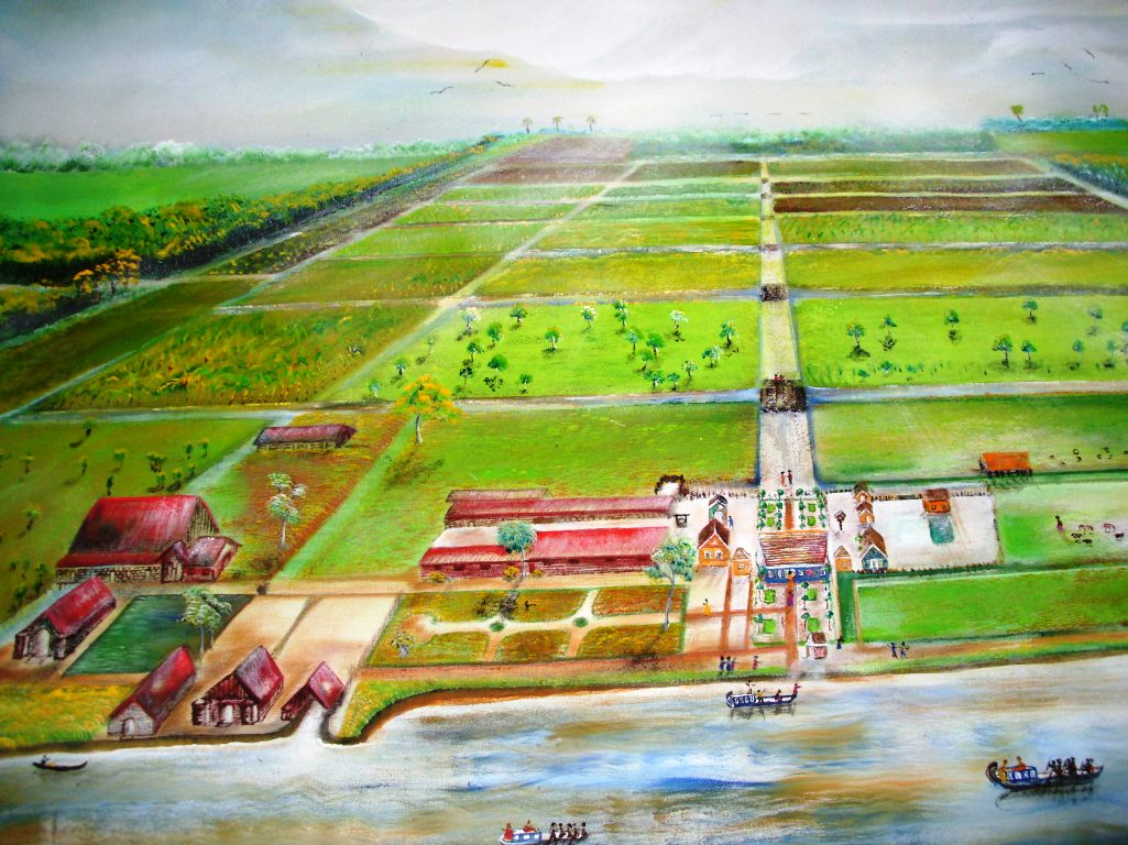 Der Ausschnitt des hier abgebildeten Aquarells der Plantage Breukelerwaard in Suriname am Commewijne wurde 2008 von dem Surinamer Eric Dhanilal angefertigt und befindet sich im Eigentum des Vorsitzenden der Charlotte van der Lith Stiftung in Suriname, Bernd Katt alias Brokopondo. Vorlage war ein Gemälde von C. L. Timme, dass zwischen 1770- und 1793 entstand und von den Nachfahren von Charlotte van der Lith in Auftrag gegeben wurde.